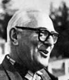 José Pedroni (1899—1968)